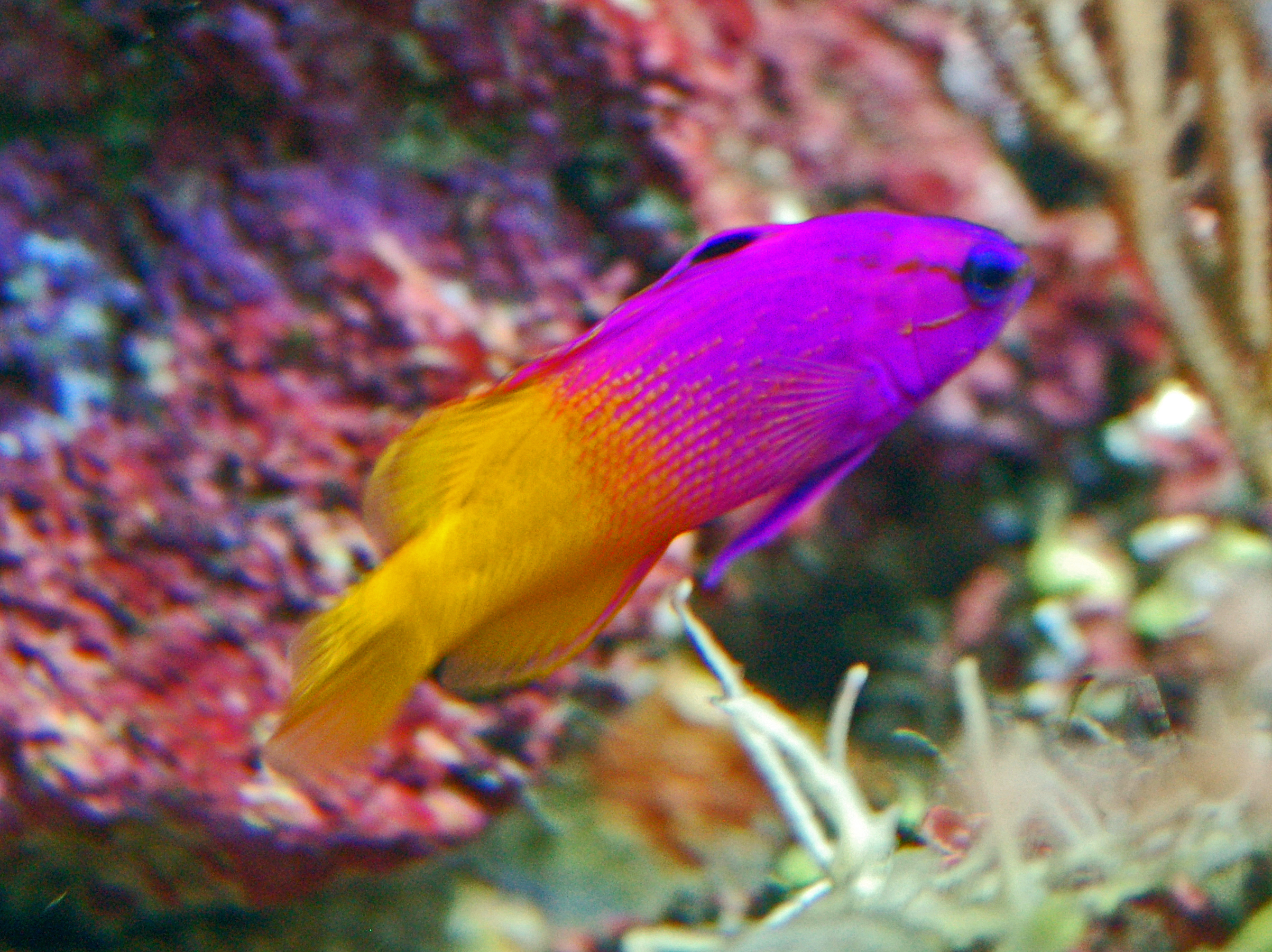 Gramma loreto at Monaco Aquarium